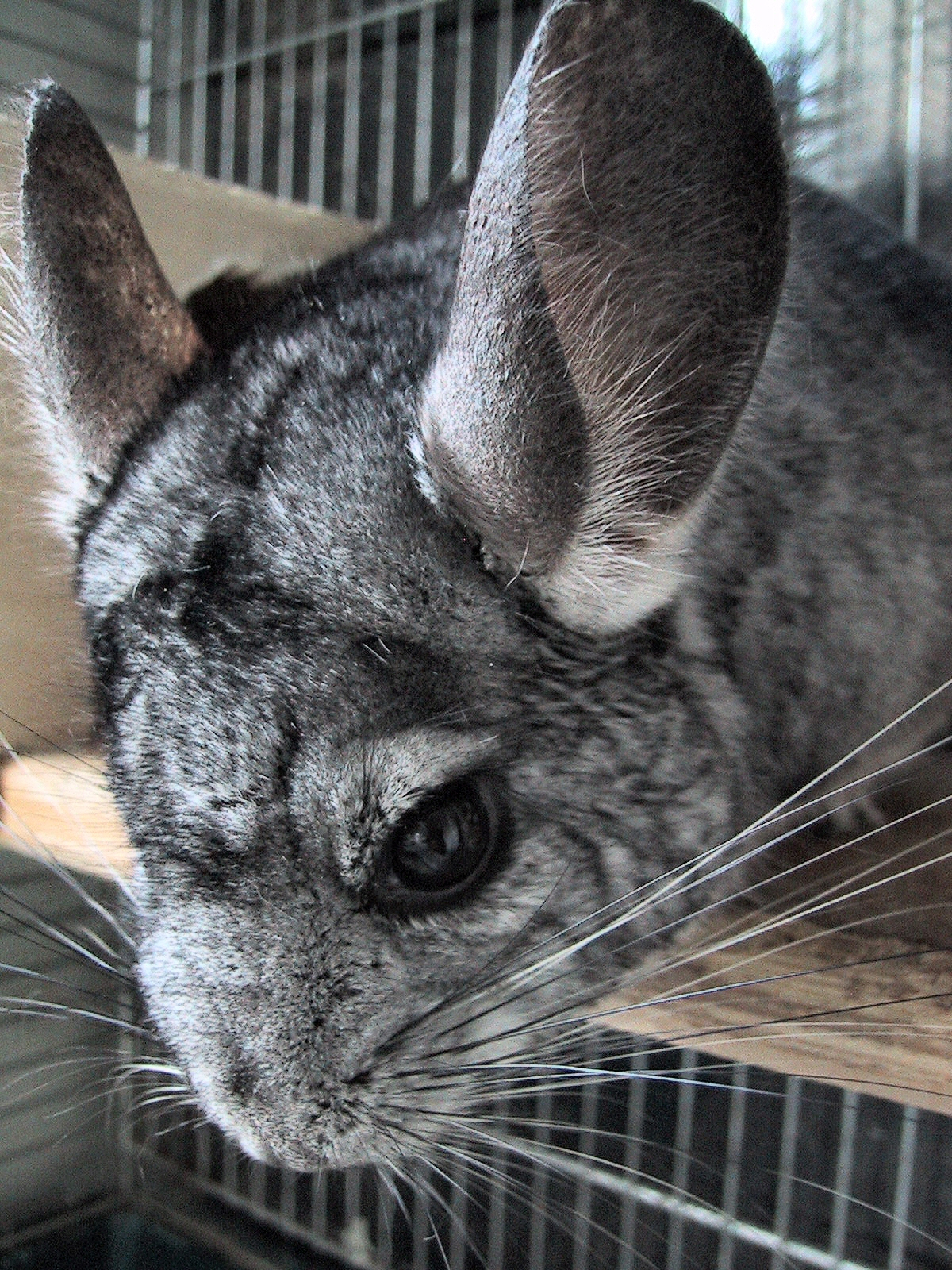 Domestic Chinchilla, head. Tête de chinchilla domestique. Adulte, mâle.